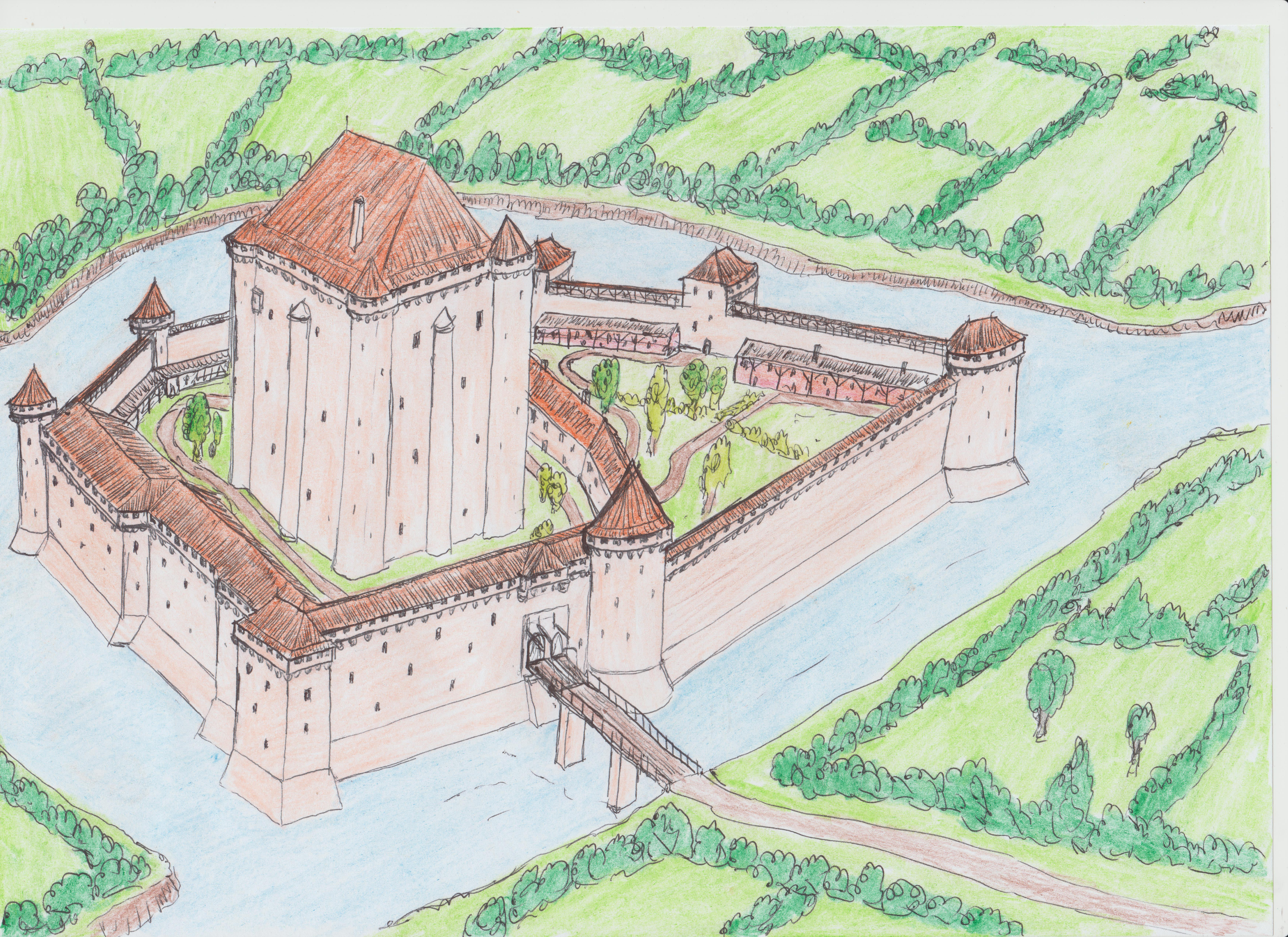 Dessin montrant une reconstitution possible du château de Sainte-Hermine (Vendée) à la fin du Moyen-Age.